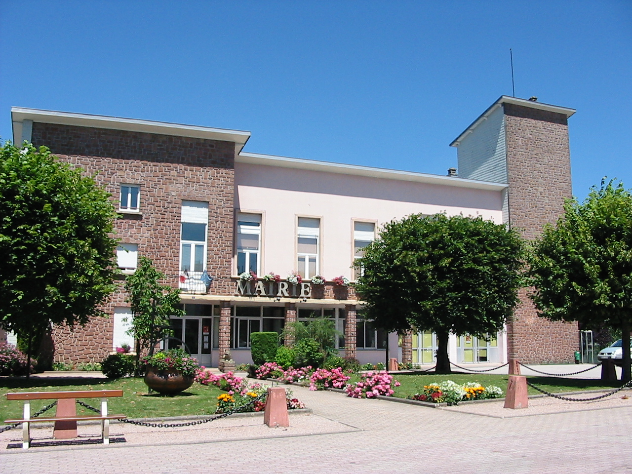 Mairie de Corcieux, commune des Vosges.